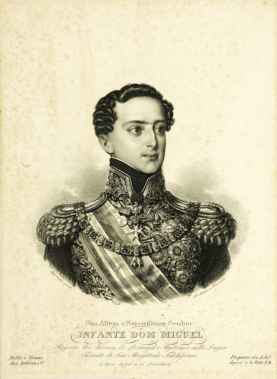 Michael I. von Portugal, Porträtstich von Stöber nach Johann Ender